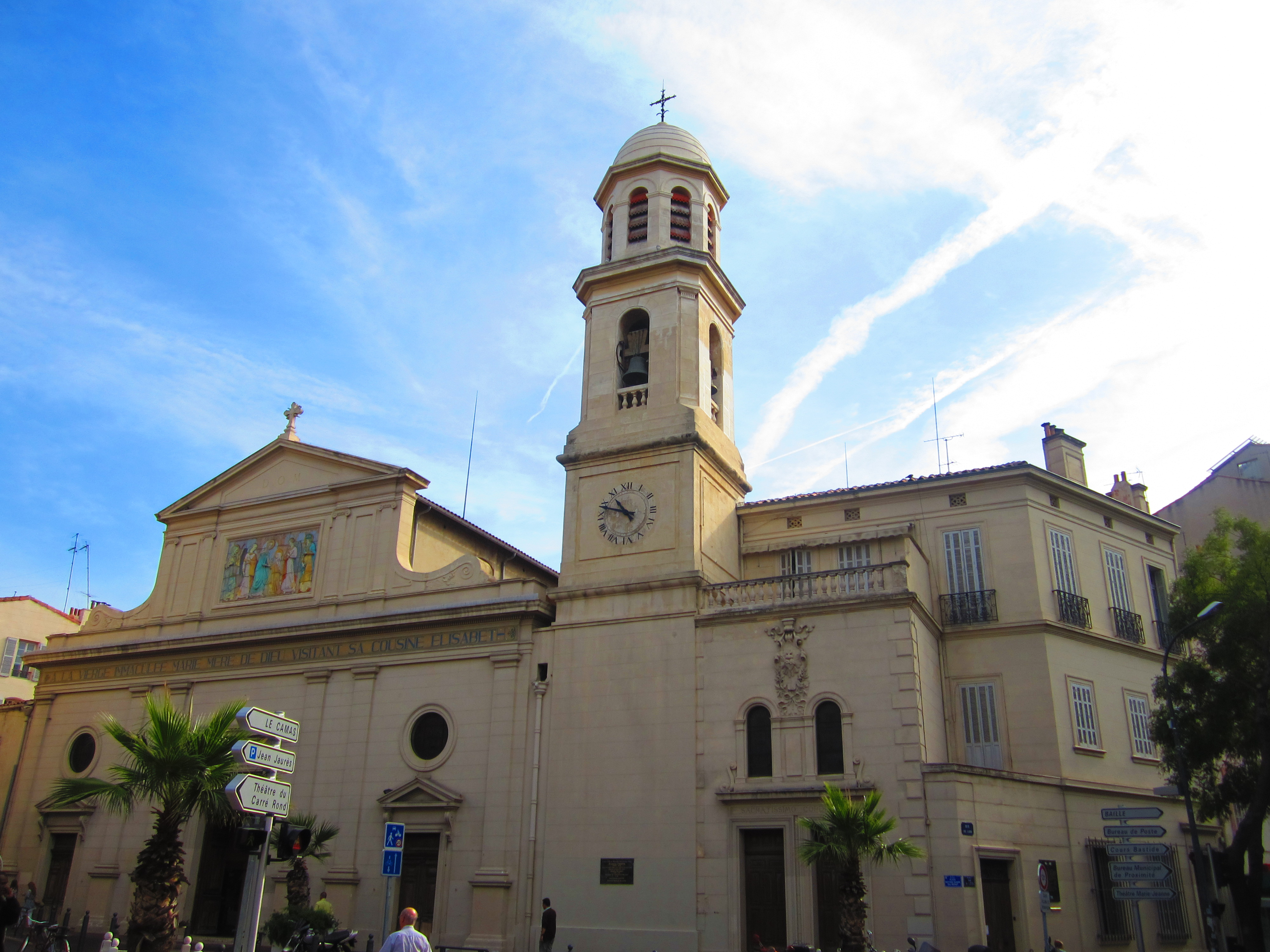 Eglise Notre-Dame du mont à Marseille